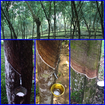 Mosaico vinculado al látex.